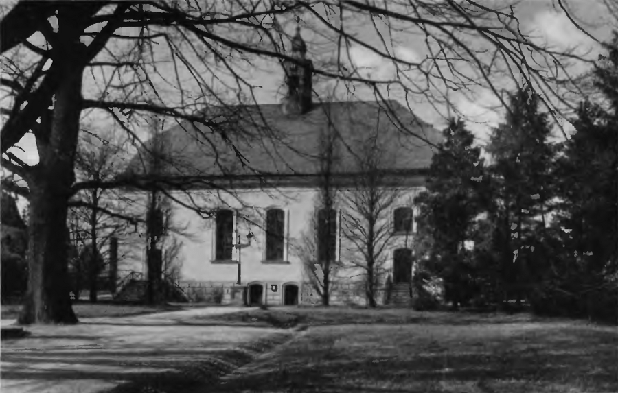 Bethaus der Herrnhuter Bruedergemeine in Gnadenfeld in Oberschlesien um 1930